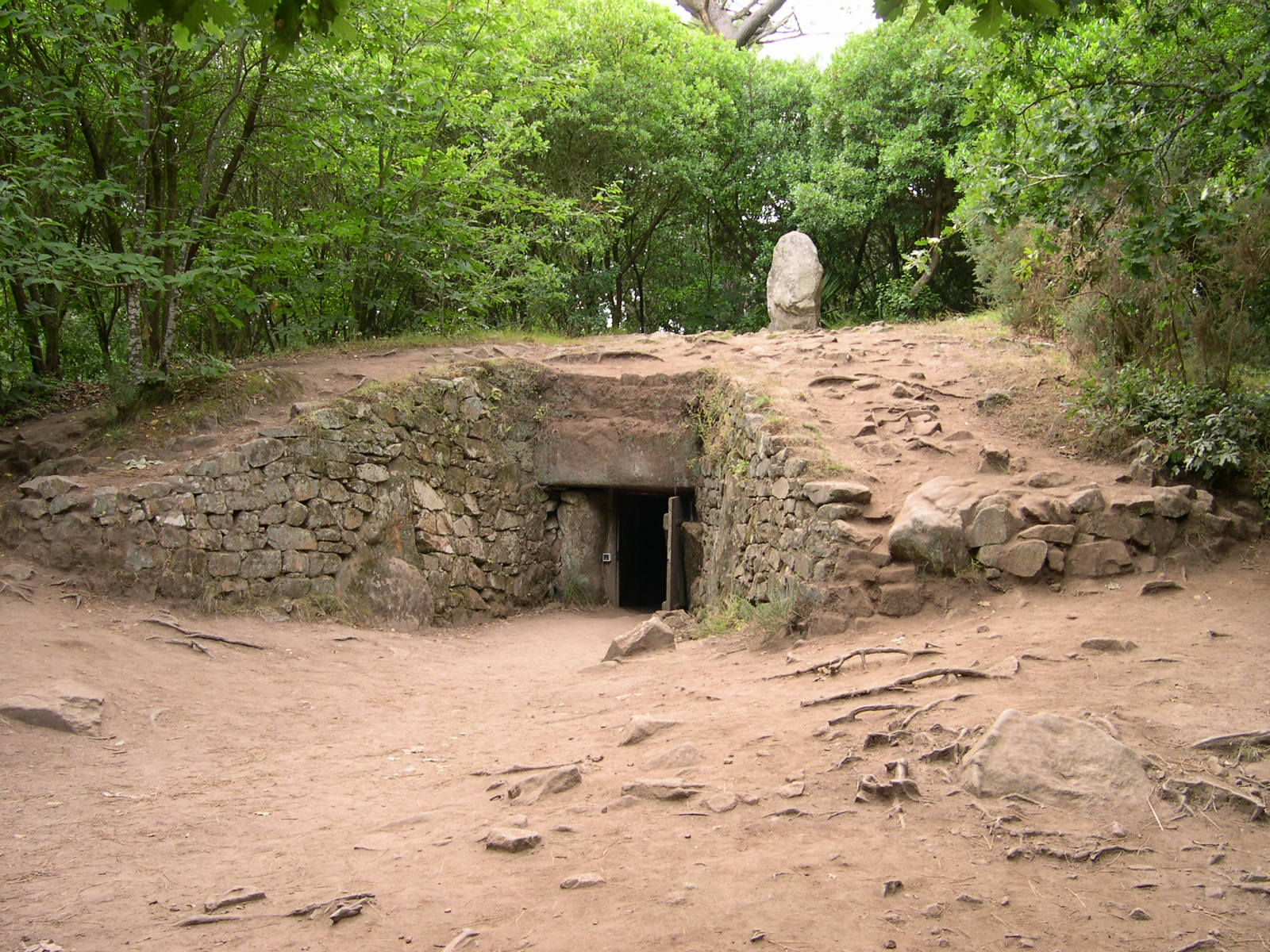 Tumulus de Kercado - Carnac - Morbihan - France - Mérimée PA00091139 .